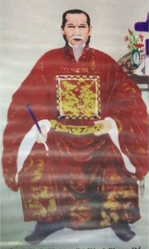 Tranh chân dung Phan Huy Cẩn (1722 - 1789), vẽ trên lụa. Ông là một danh thần và là nhà sử học thời Lê trung hưng. Bức họa đặt tại nhà thờ họ Phan Huy.